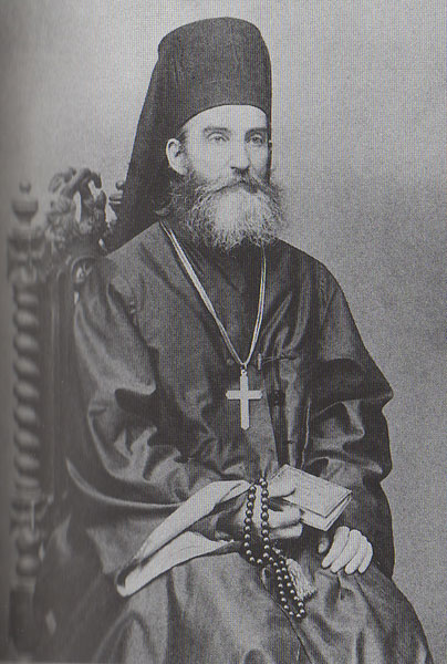 Епископ Герасим Петрановић